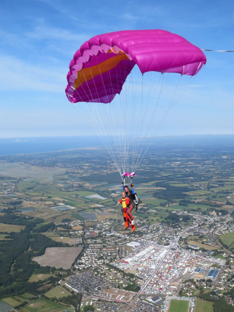 Vol en parachute tandem le long des plages du débarquement en Normandy.